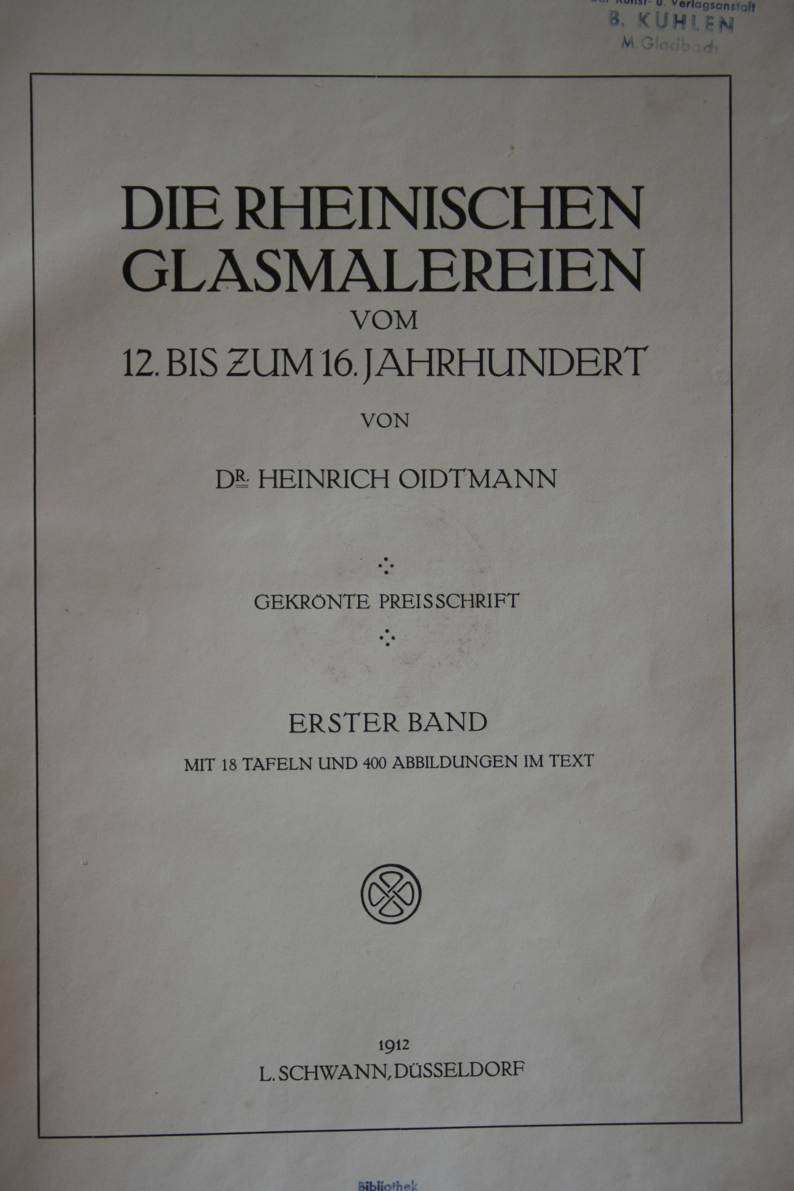 Titelbatt des Buches von Heinrich Oidtmann: Die rheinischen Glasmalereien vom 12. zum 16. Jahrhundert. Bd. 1, Schwann Verlag, Düsseldorf 1912